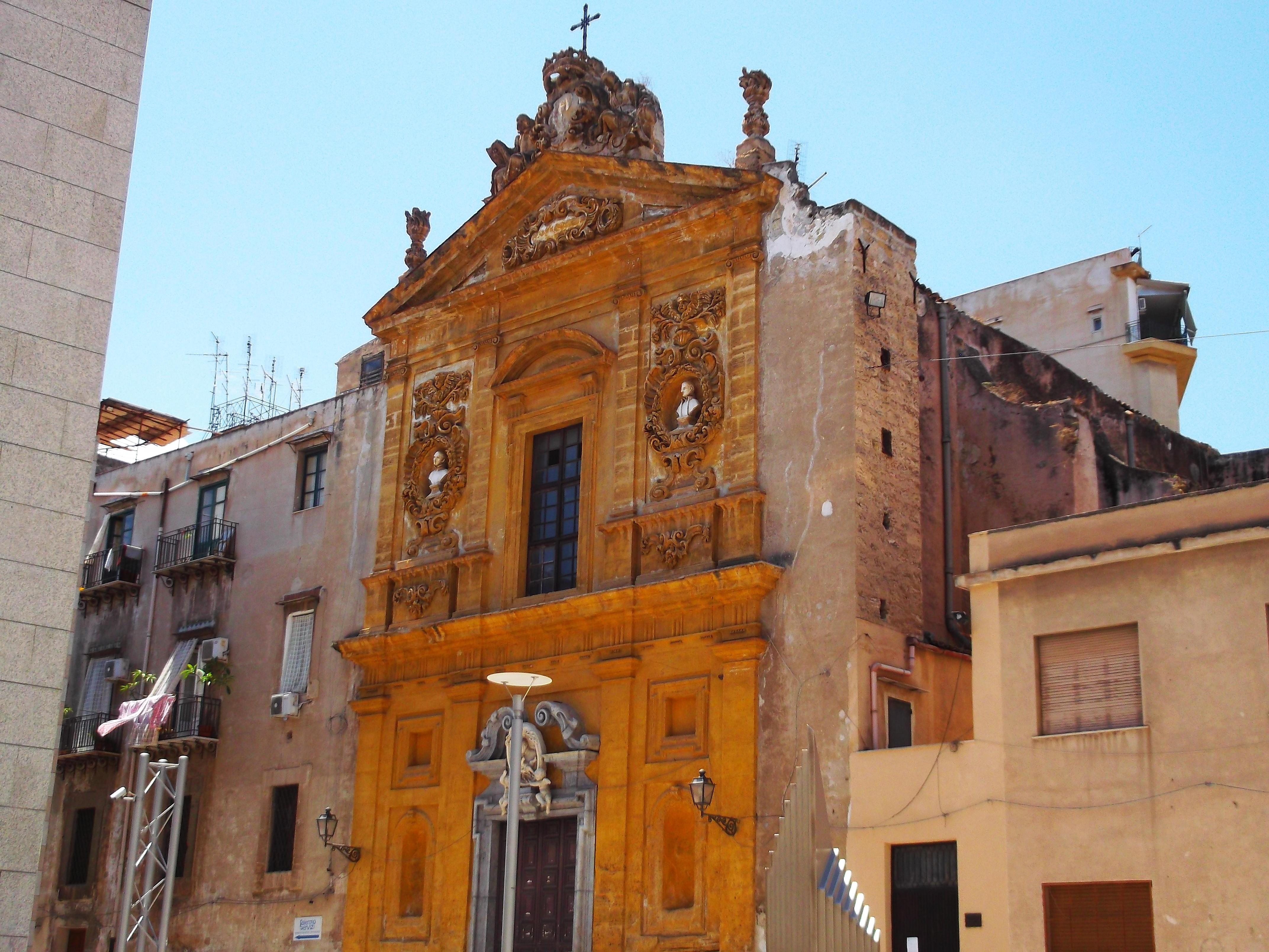 Chiesa di San Stanislao, Palermo